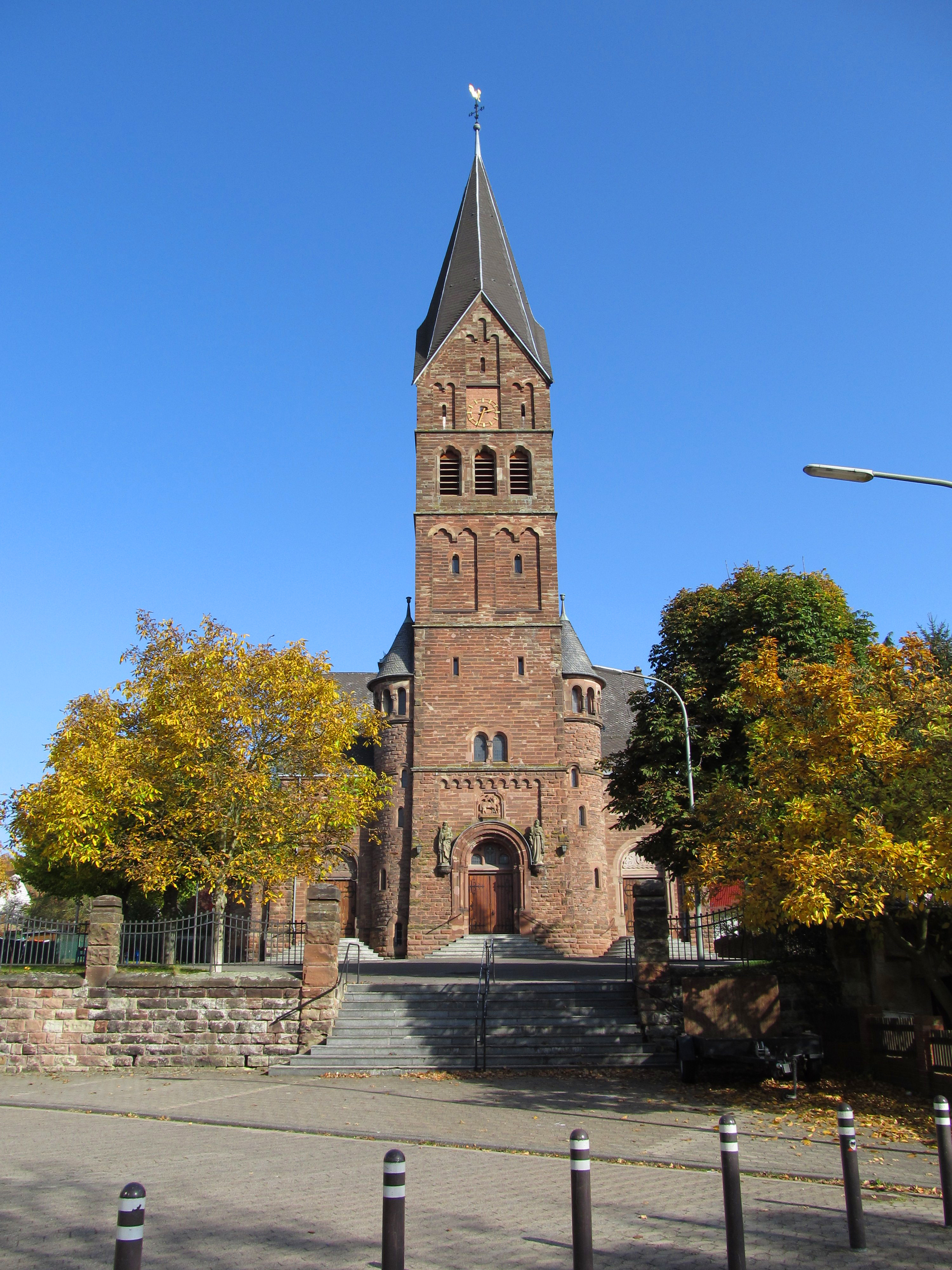 Die katholische Pfarrkirche St. Agatha in Kleinblittersdorf, Regionalverband Saarbrücken, Saarland